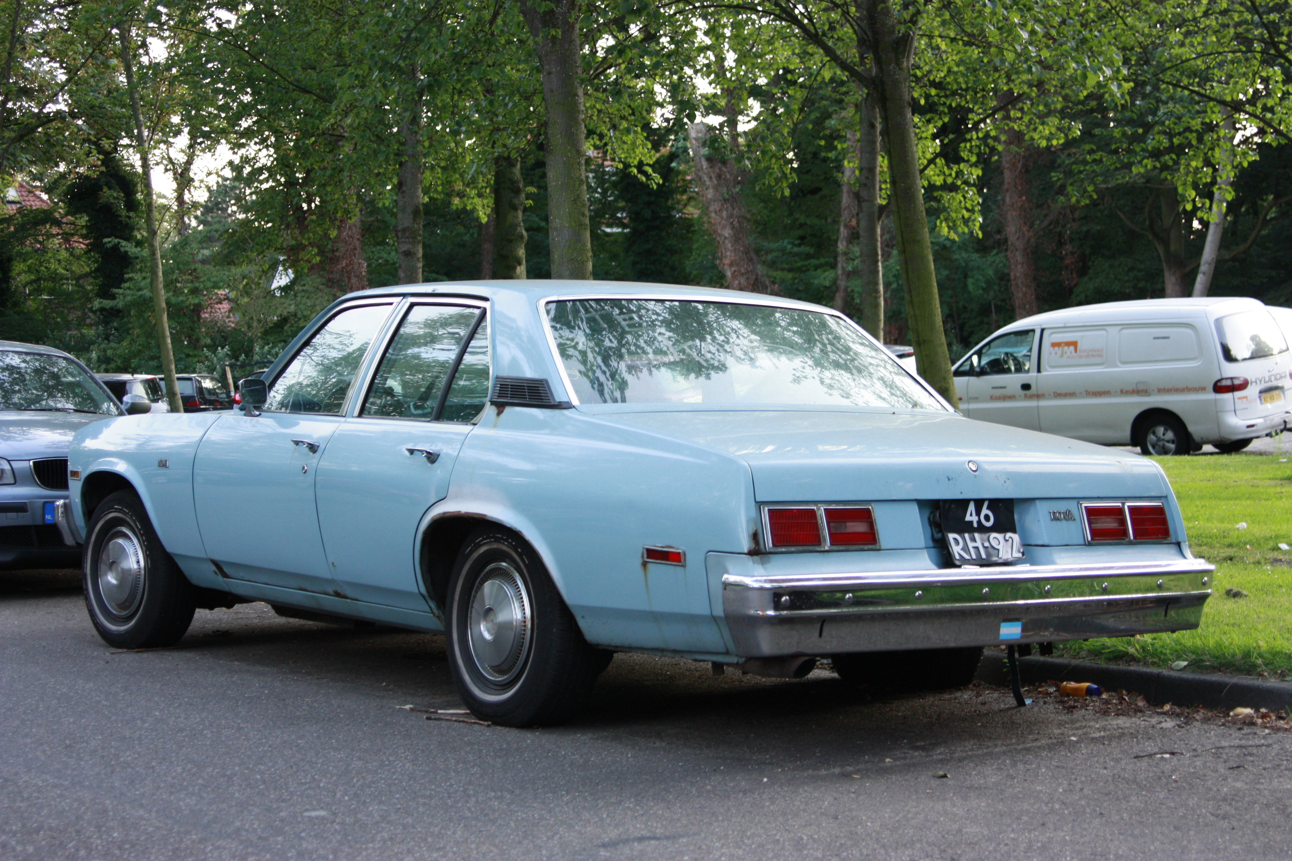 Datum eerste toelating 30-06-1976(showing standard rust options in '76) Datum eerste afgifte Nederland 27-04-1977